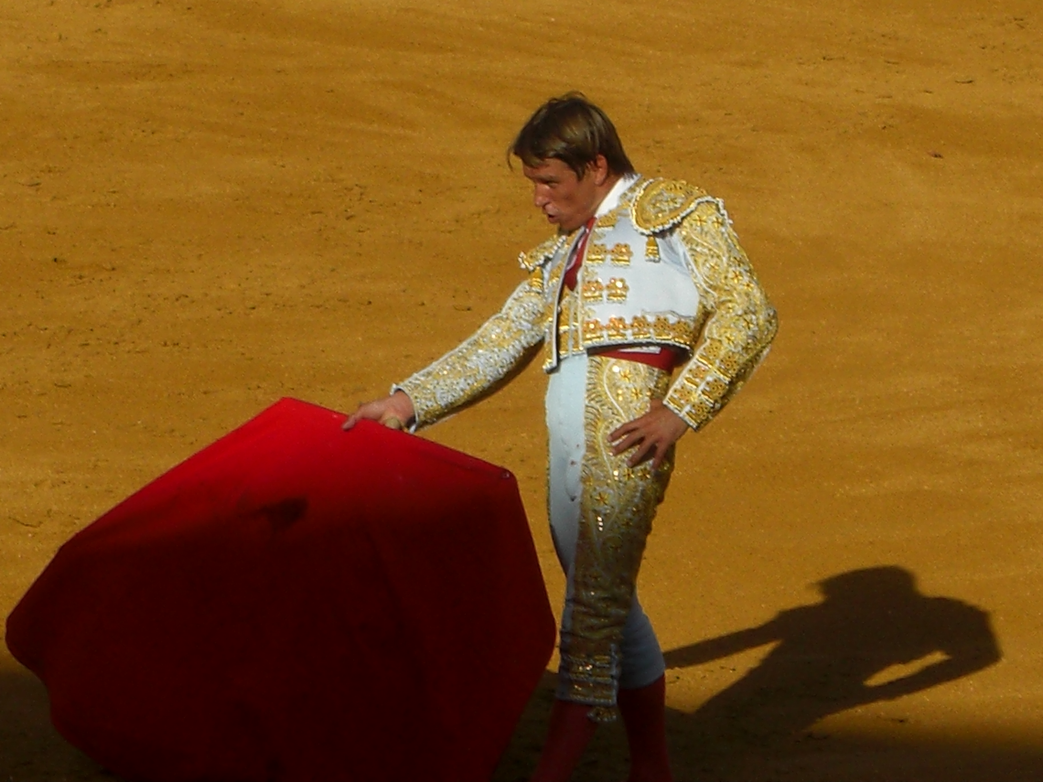 El Cordobés en una de las corridas de las Colombinas 2008 en Huelva (España).